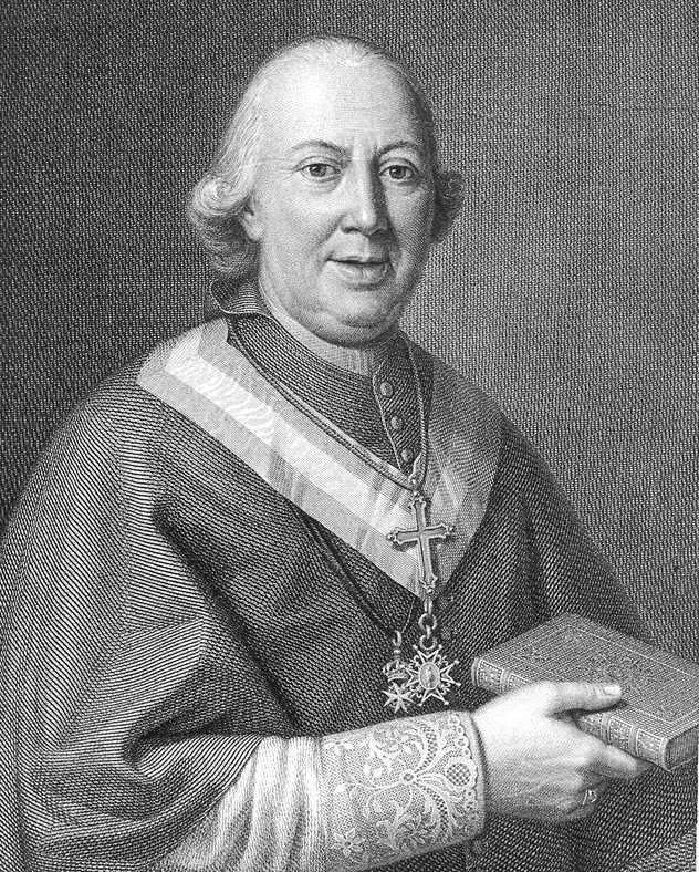 Retrato de Antonio Despuig y Dameto (1745-1813), obispo de Orihuela, arzobispo de Valencia y Sevilla, patriarca de Antioquía y cardenal.